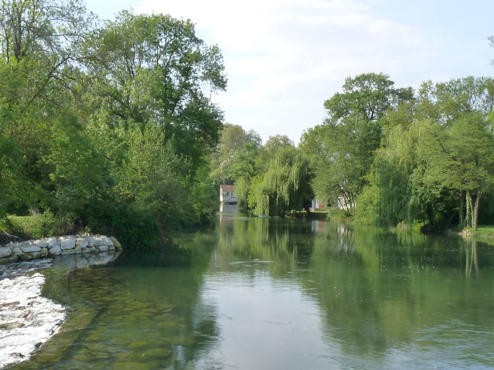 La Charente au pont de Vibrac (Charente, France), vue vers l'aval; le bourg de Vibrac à droite